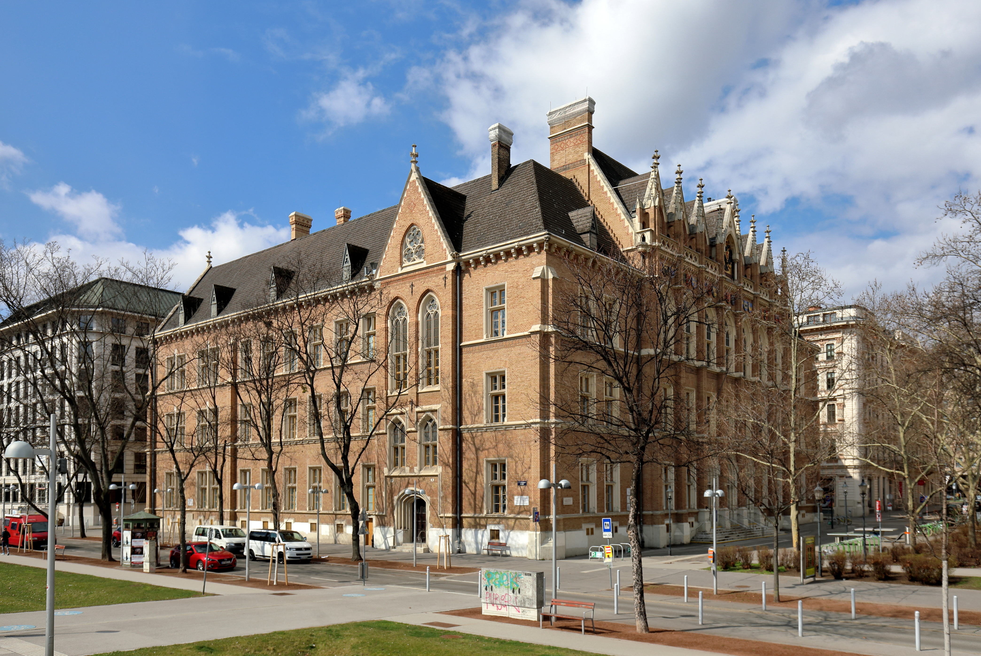 Ostansicht des Akademischen Gymnasiums am Beethovenplatz im 1. Wiener Gemeindebezirk Innere Stadt. Das dreigeschossige neugotische Schulgebäude wurde von 1863 bis 1866 nach Plänen des Architekten Friedrich von Schmidt errichtet.